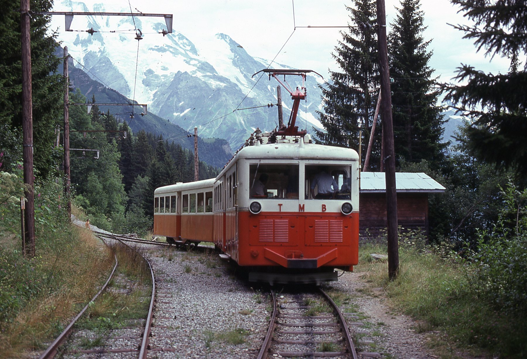 Tramway du Mont-Blanc, ancienne livrée